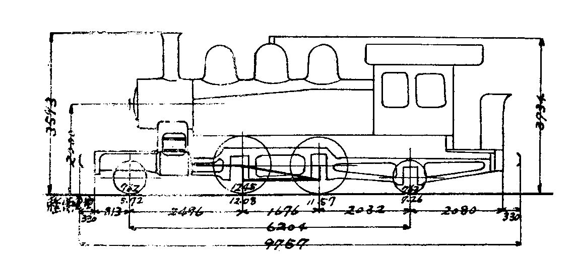 台湾総督府鉄道E14形蒸気機関車の形式図